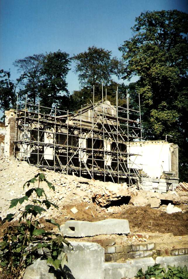 Herbouw/renovatie koetshuis als 'Villa Aalbeek'